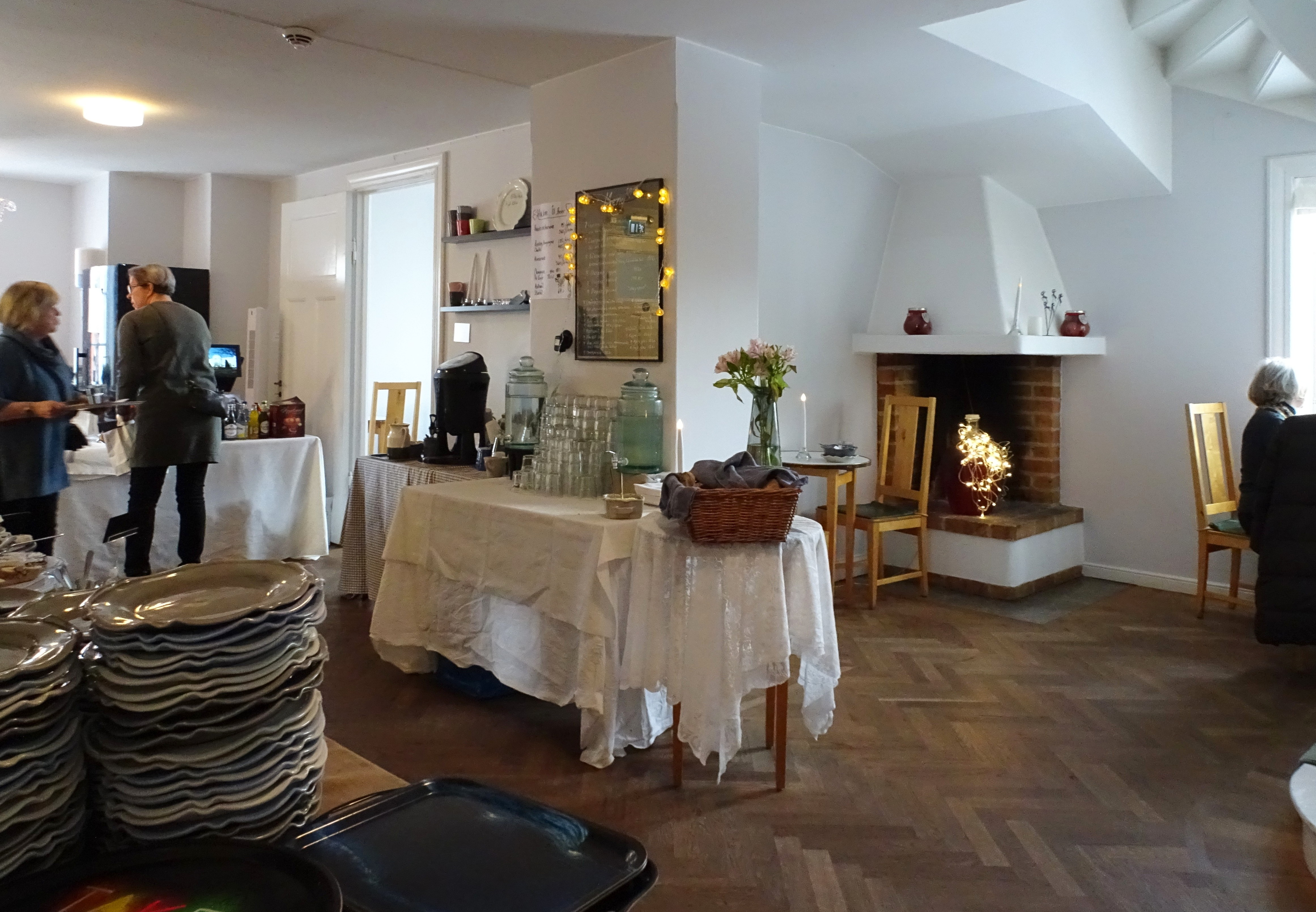 Thielska galleriets café med servering drivs i privat regi av Monika Ahlberg.